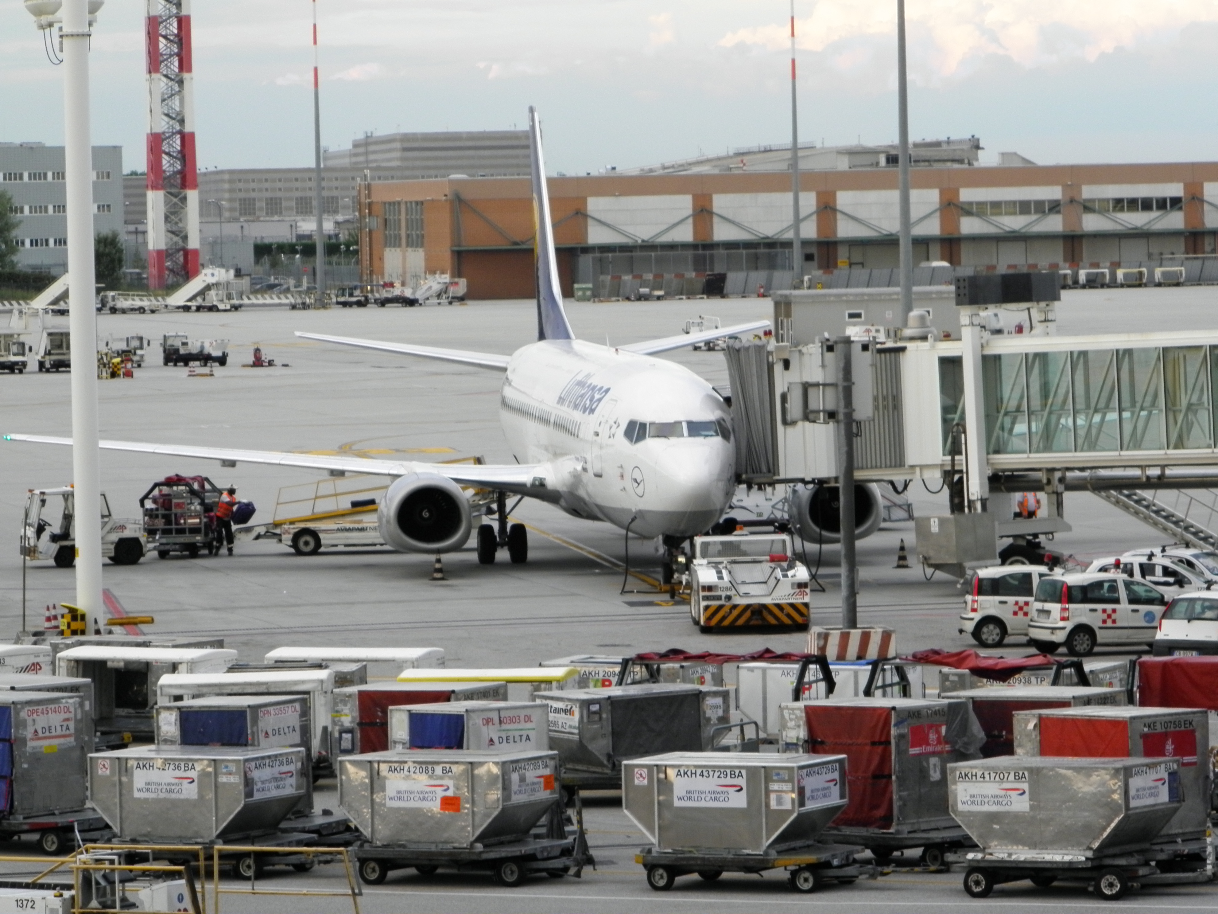 Aereo Lufthansa in sosta.